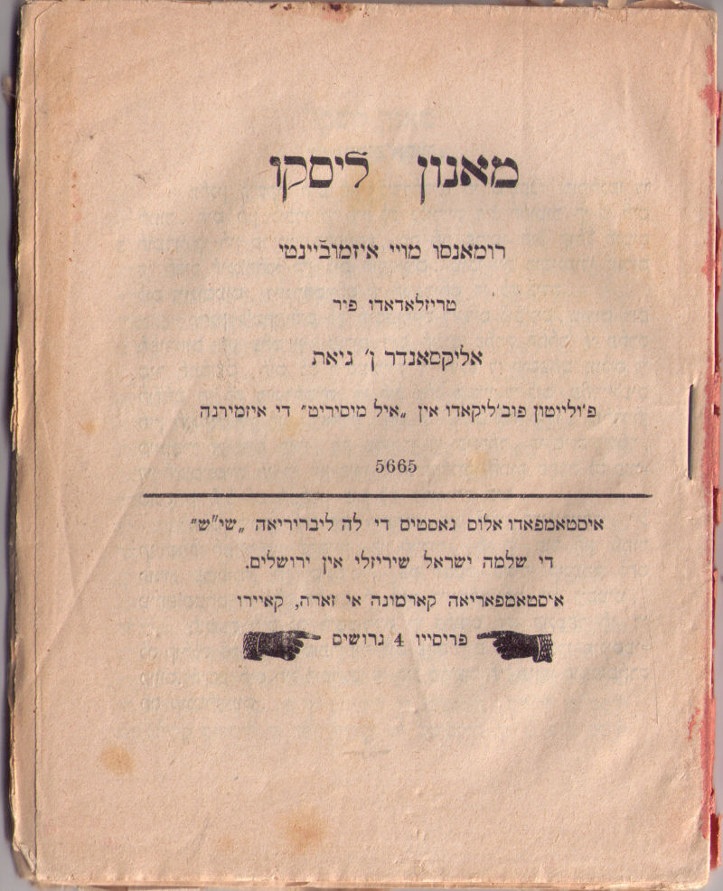 old book in Ladino